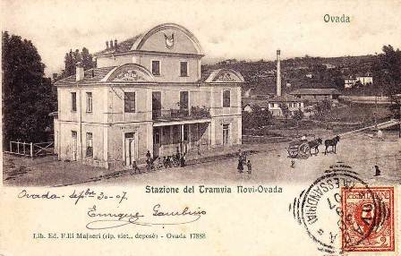 Ovada, stazione di piazza Castello